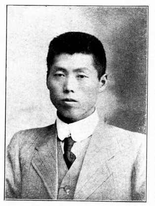 中文（台灣）: 中華民國國會議員